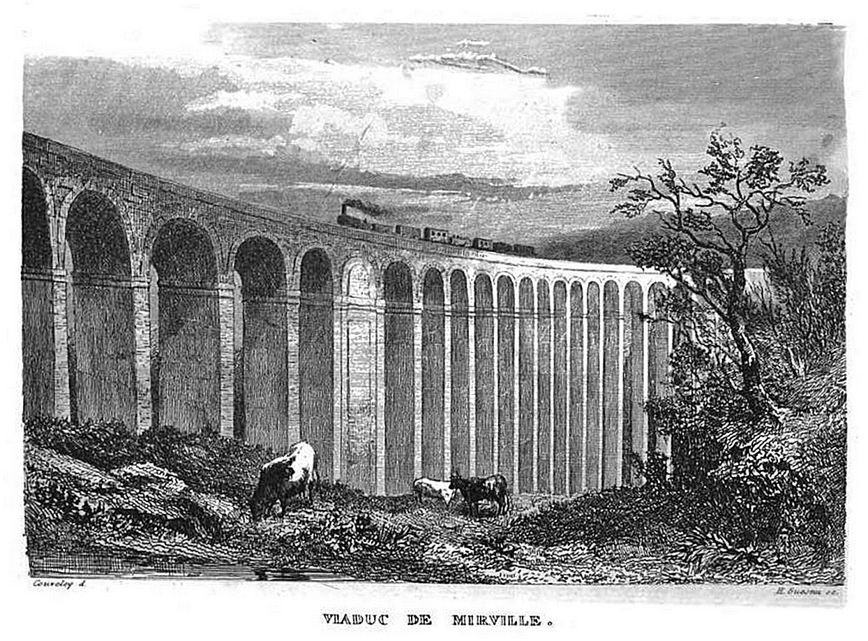 Gravure d'un dessin d'après nature du viaduc de Mirville en 1847.